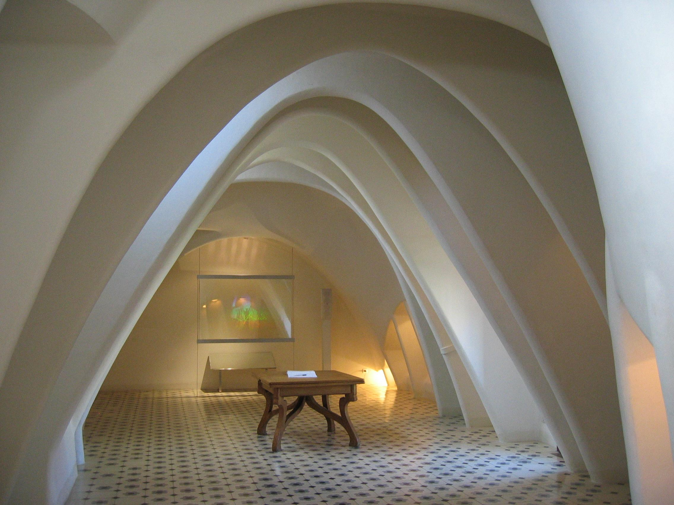 Barcelona (Spanien), Casa Batlló, sog. Dachboden.